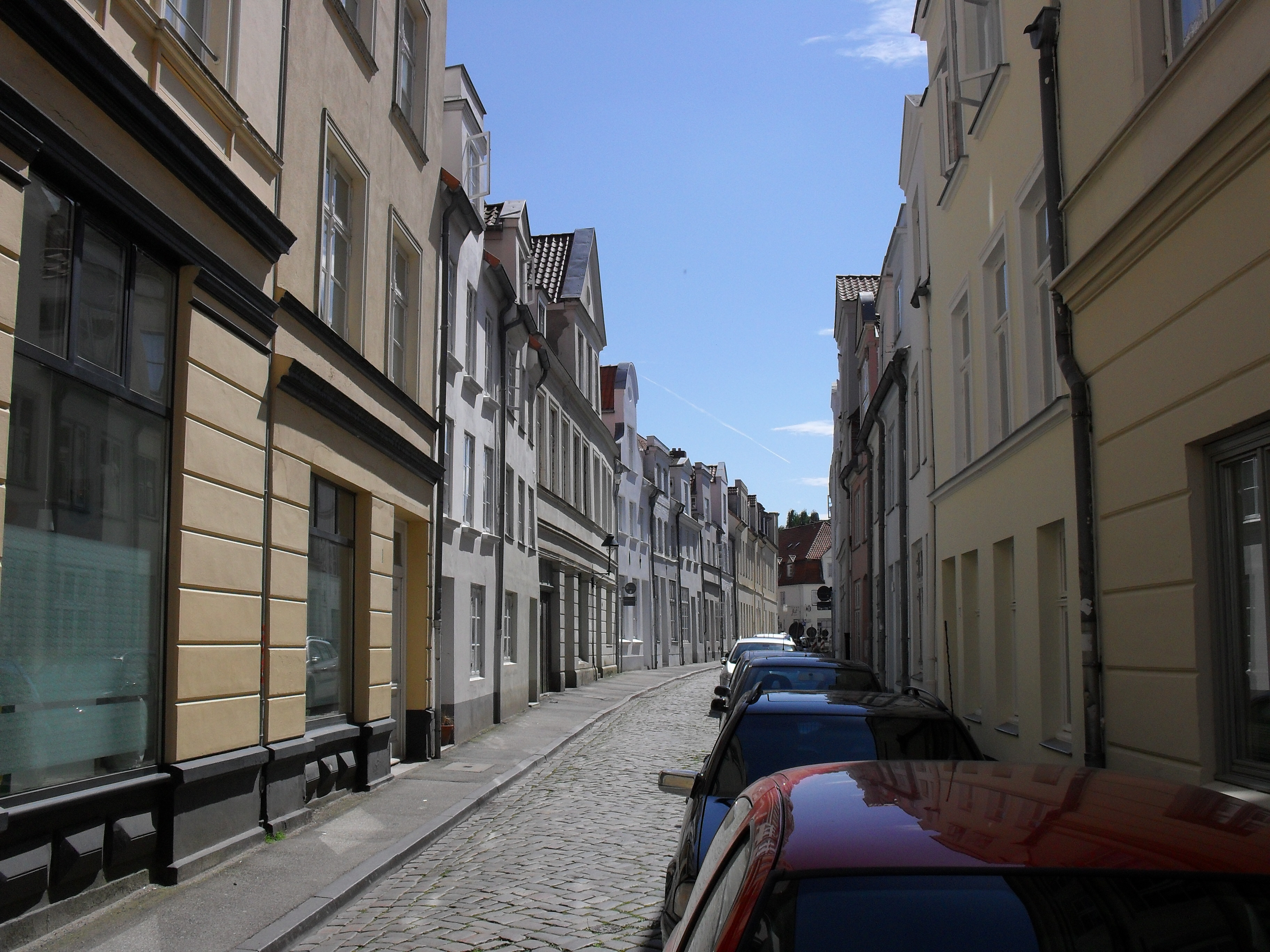 Die Schwönekenquerstraße in Lübeck